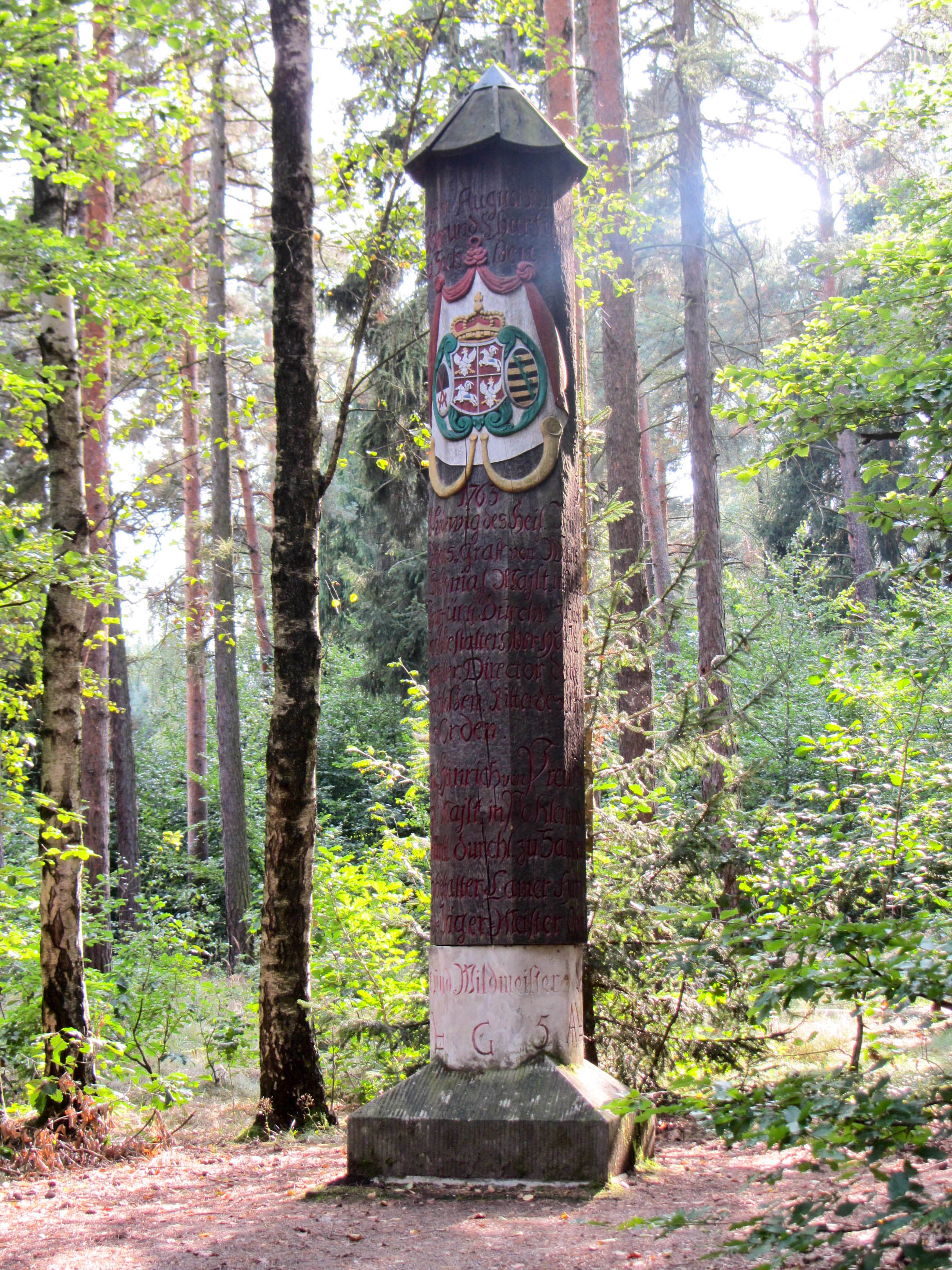 Jägereiche an einer Sieben-Wege-Spinne im Zentrum der Dahlener Heide. Aufgestellt 1763 zur Erinnerung an den sächsischen Kurfürsten und König von Polen Friedrich August wurde nach der letzten Hofjagd. Reste der Originalsäule befinden sich in der Dorfkirche zu Sitzenroda. Eine weitere Nachbildung wurde nach 1945 geborgen und befindet sich im Heimatmuseum in Dahlen.